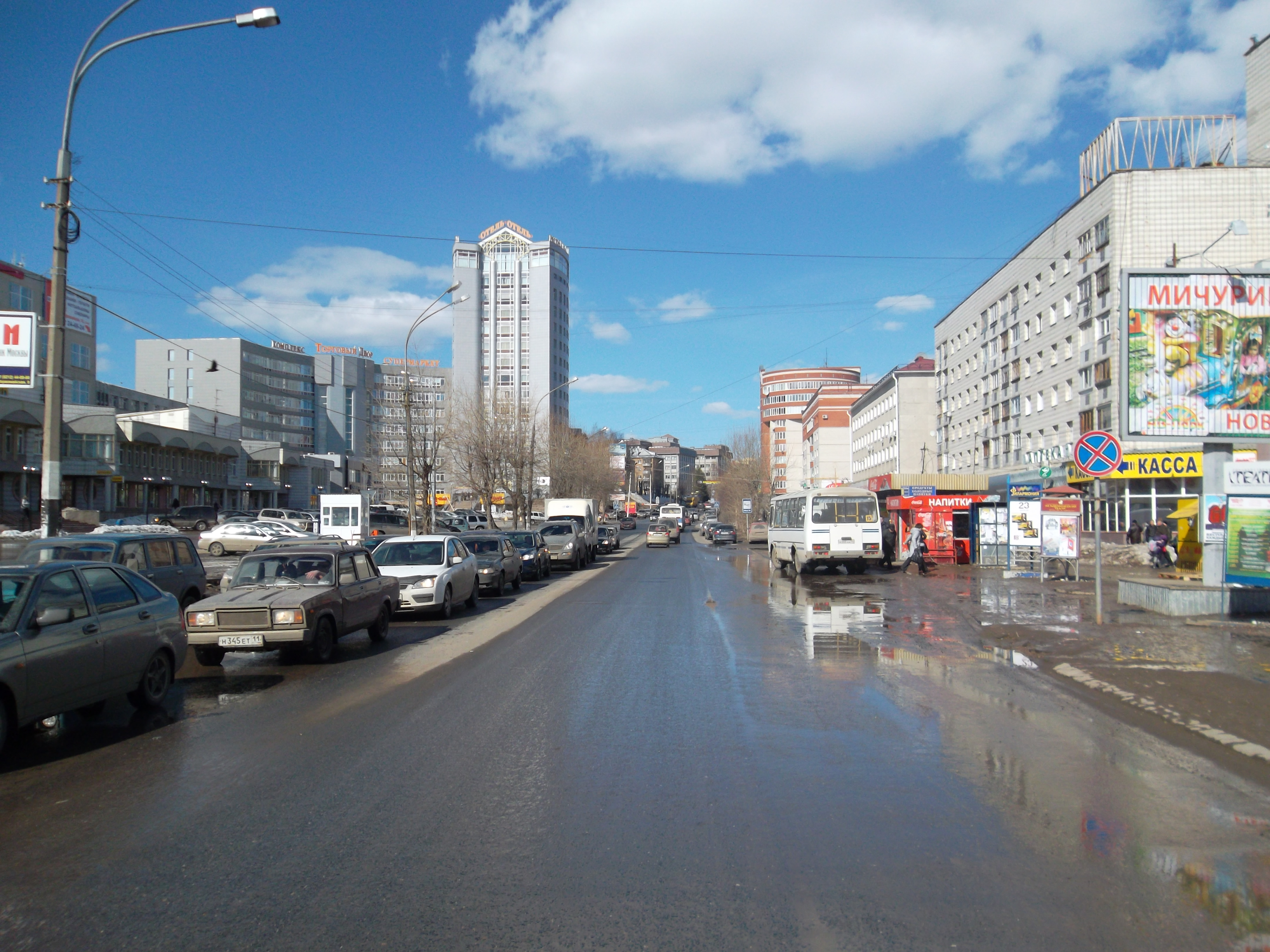 Улица в Сыктывкаре. Коми: Улича Сыктывкарын.